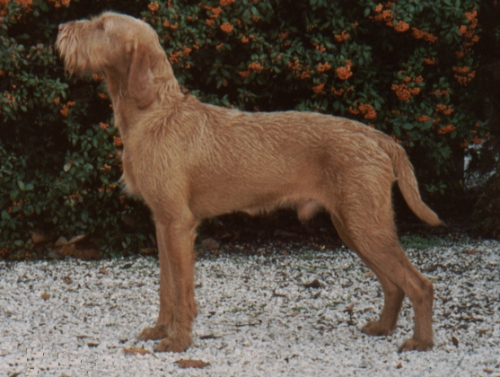 Drótszőrű magyar vizsla